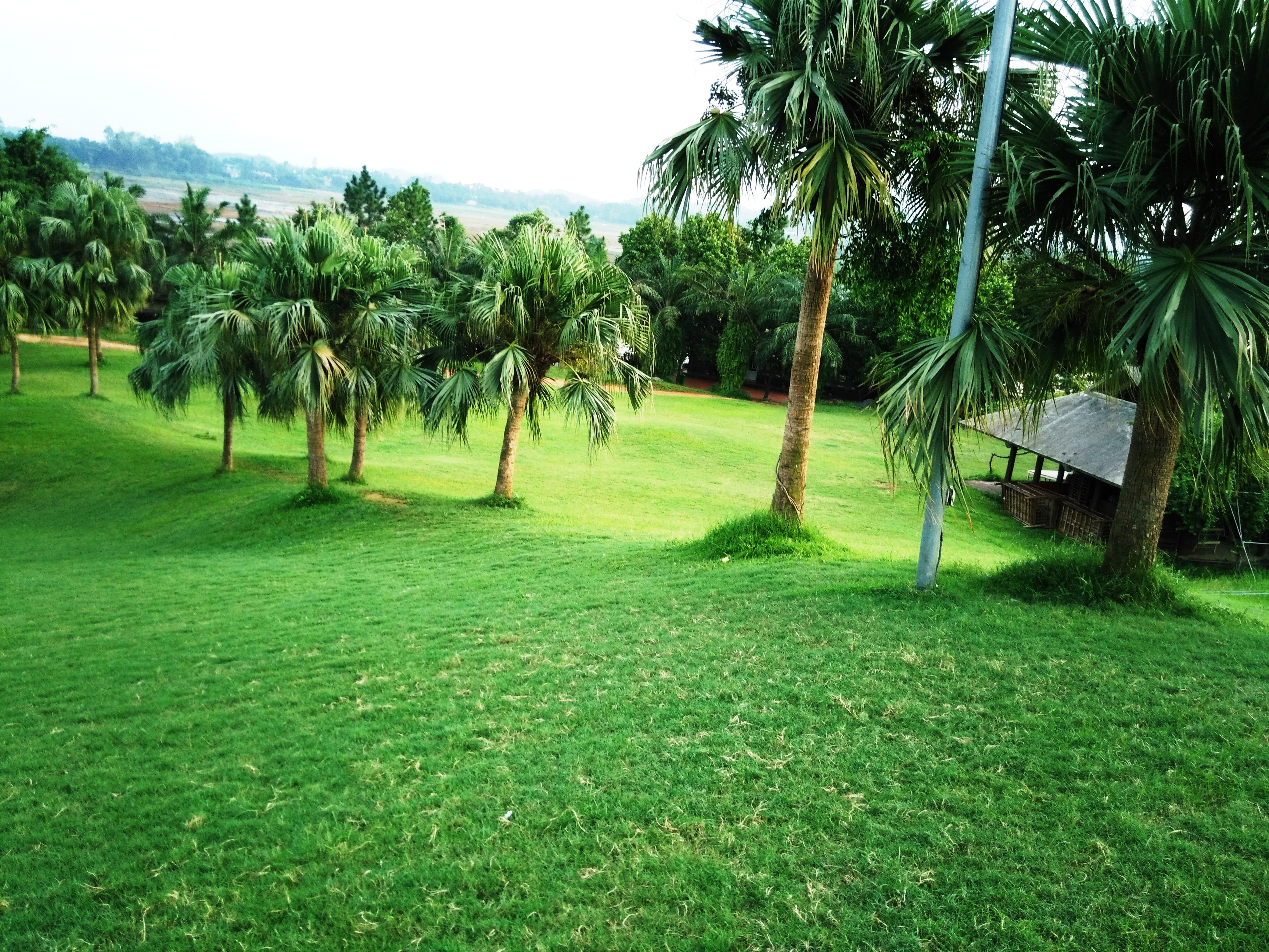 Khu nghỉ dưỡng Trung Sơn Trầm ở Sơn Tây